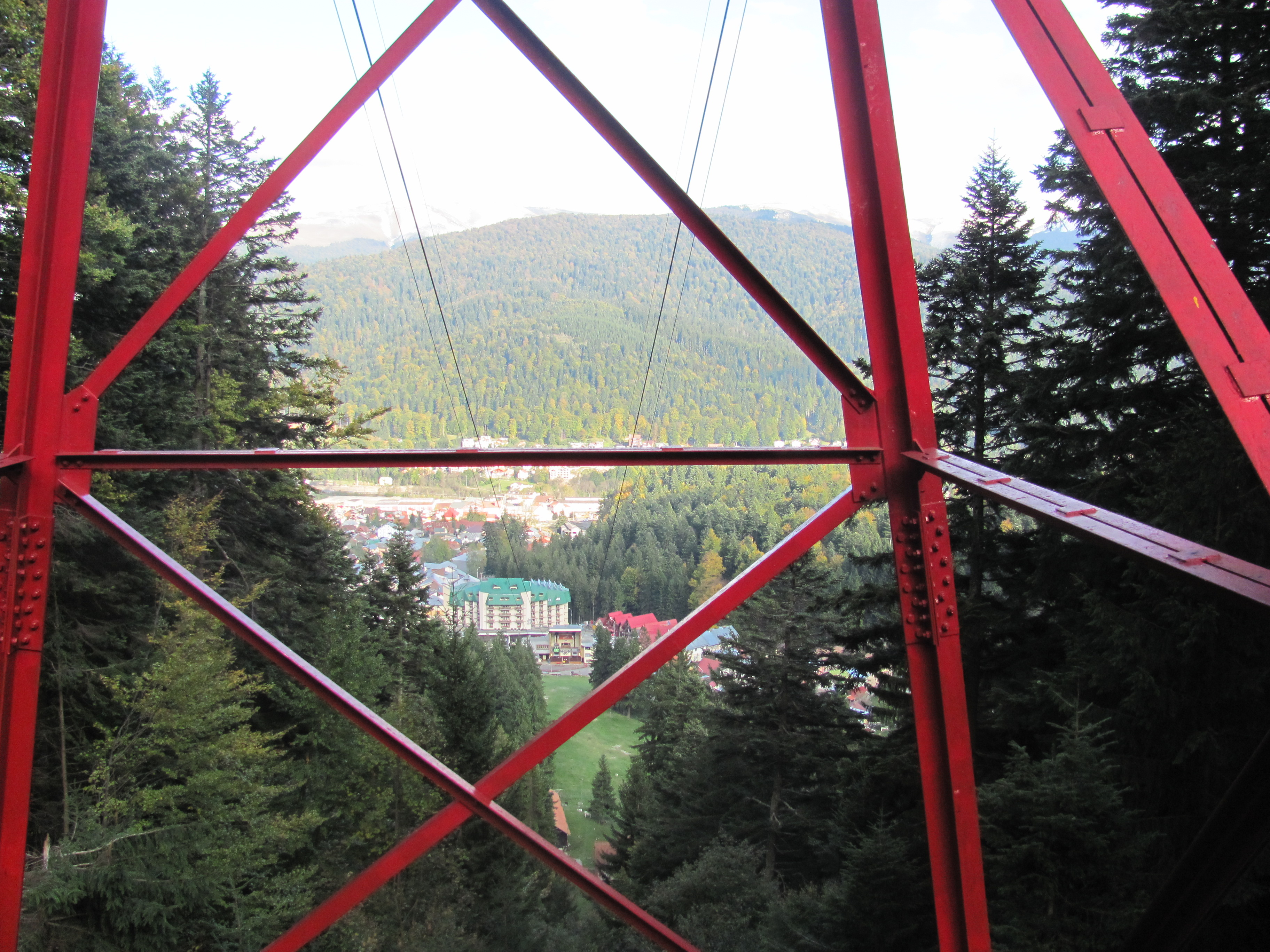 Vedere spre telecabină de la primul stalp-detalii